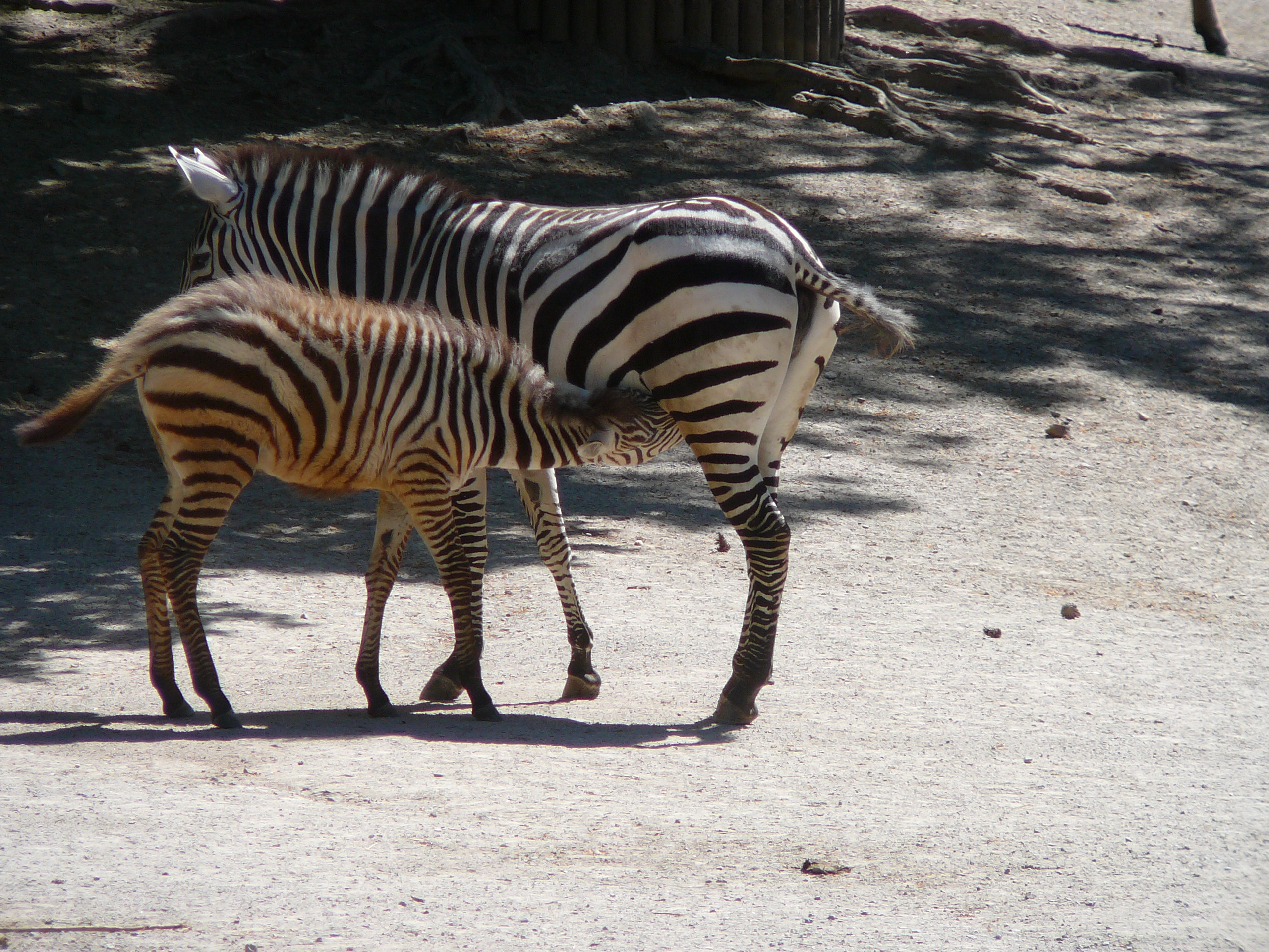 Equus quagga boehmi